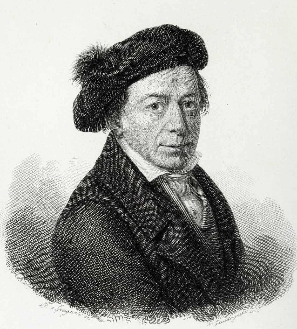 Francesco Rosaspina (bulino).